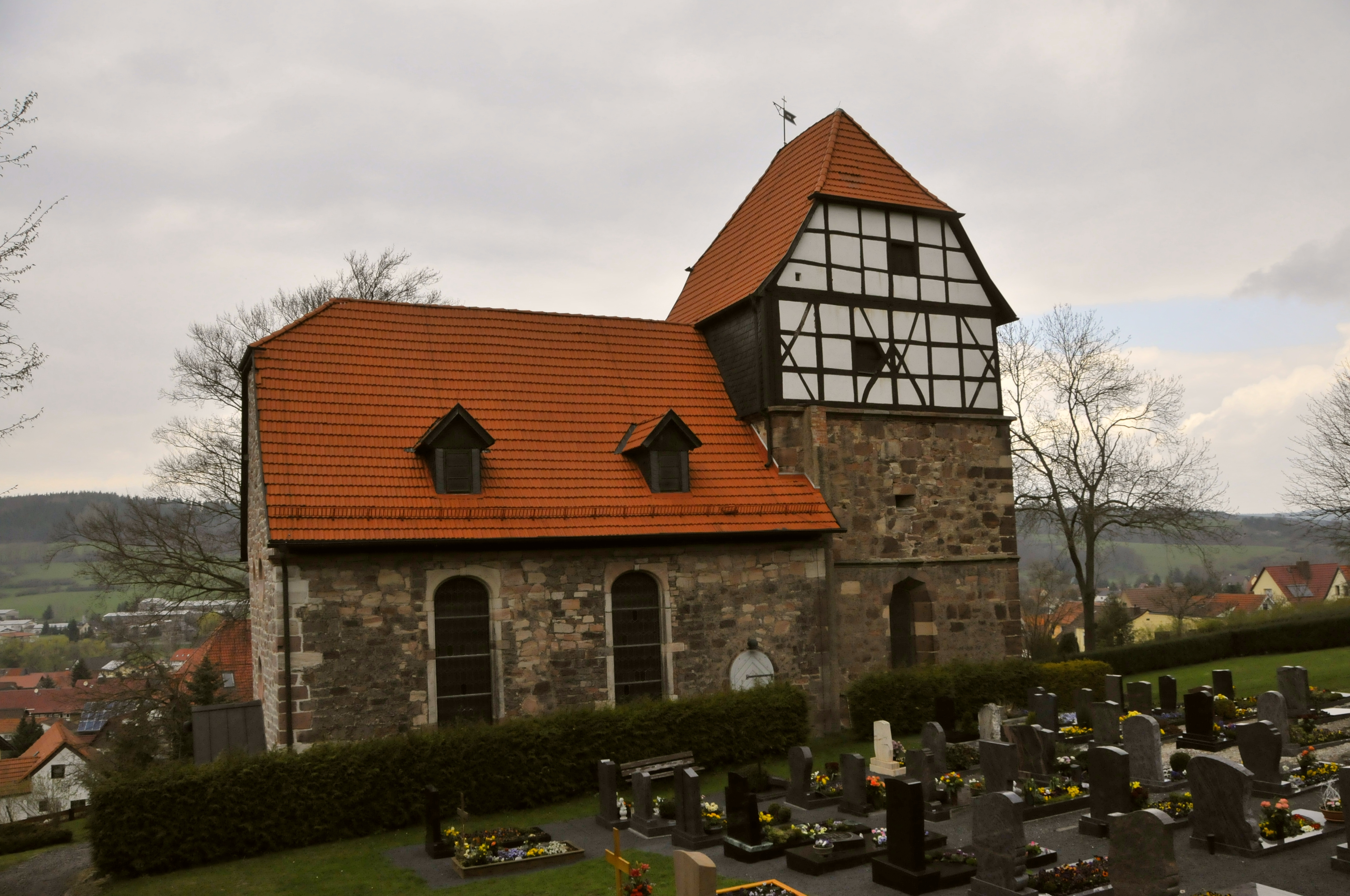 Merkers, Kieselbach. Kirche